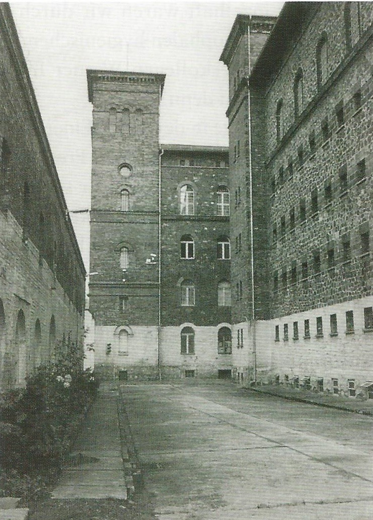 Gefängnis Roter Ochse in Halle (Saale), heute JVA I